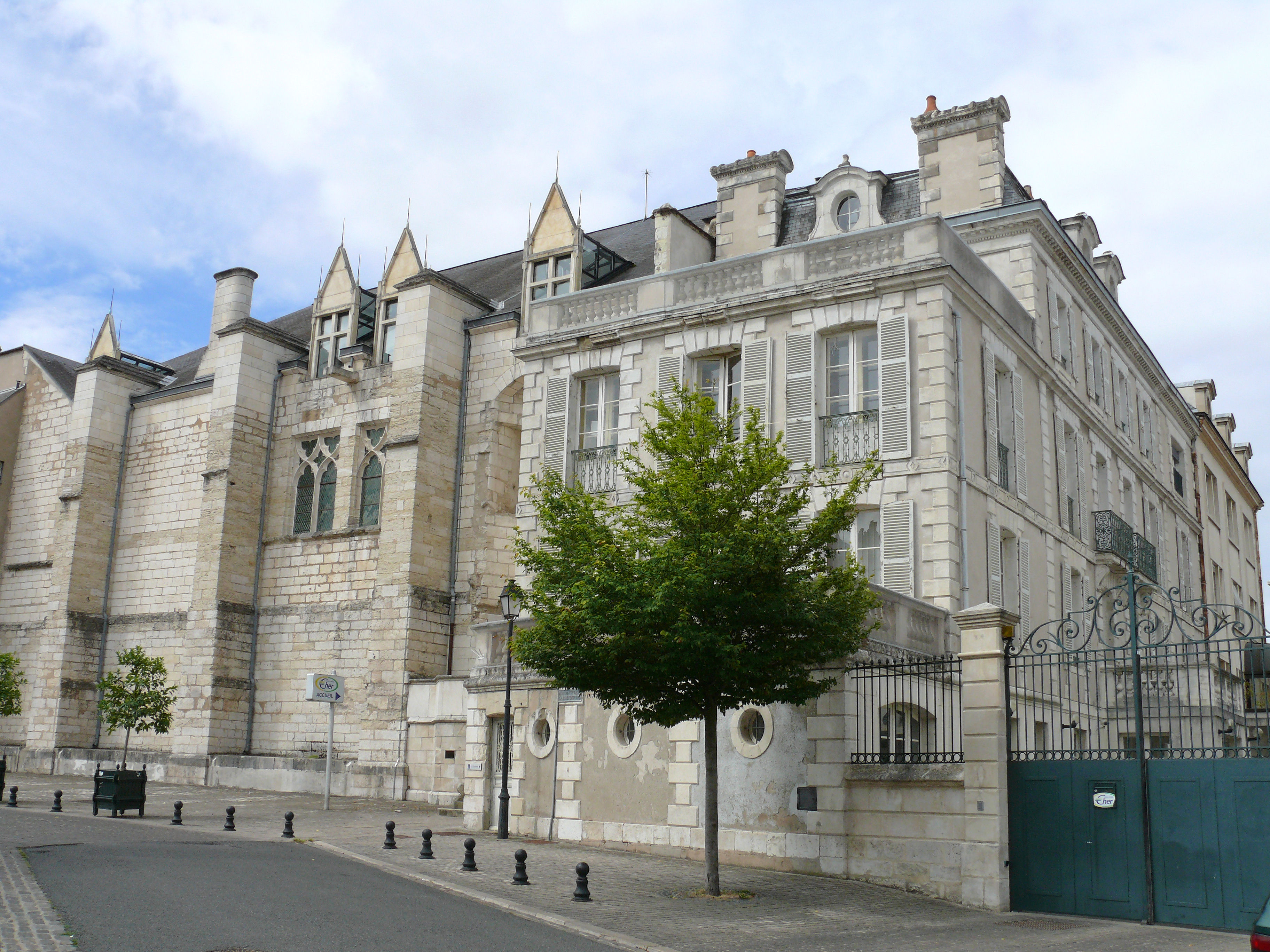 Bourges - Palais ducal et les bâtiments du conseil général